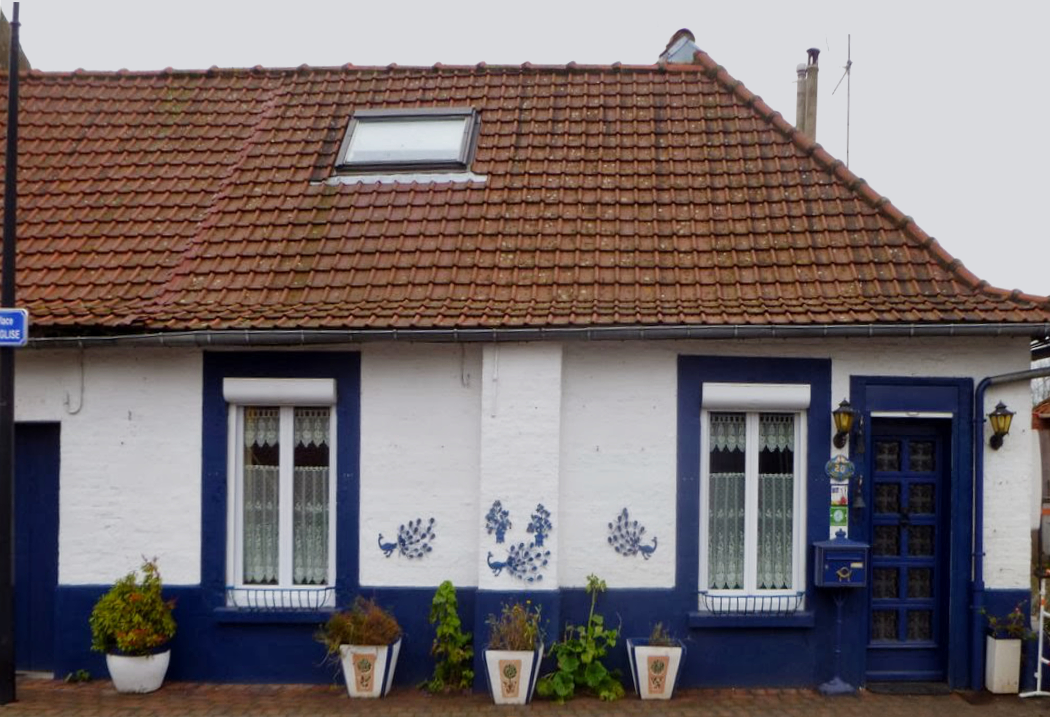 Maison dite Rouge-Barre à Noyelles-lès-Seclin, Nord.- France.